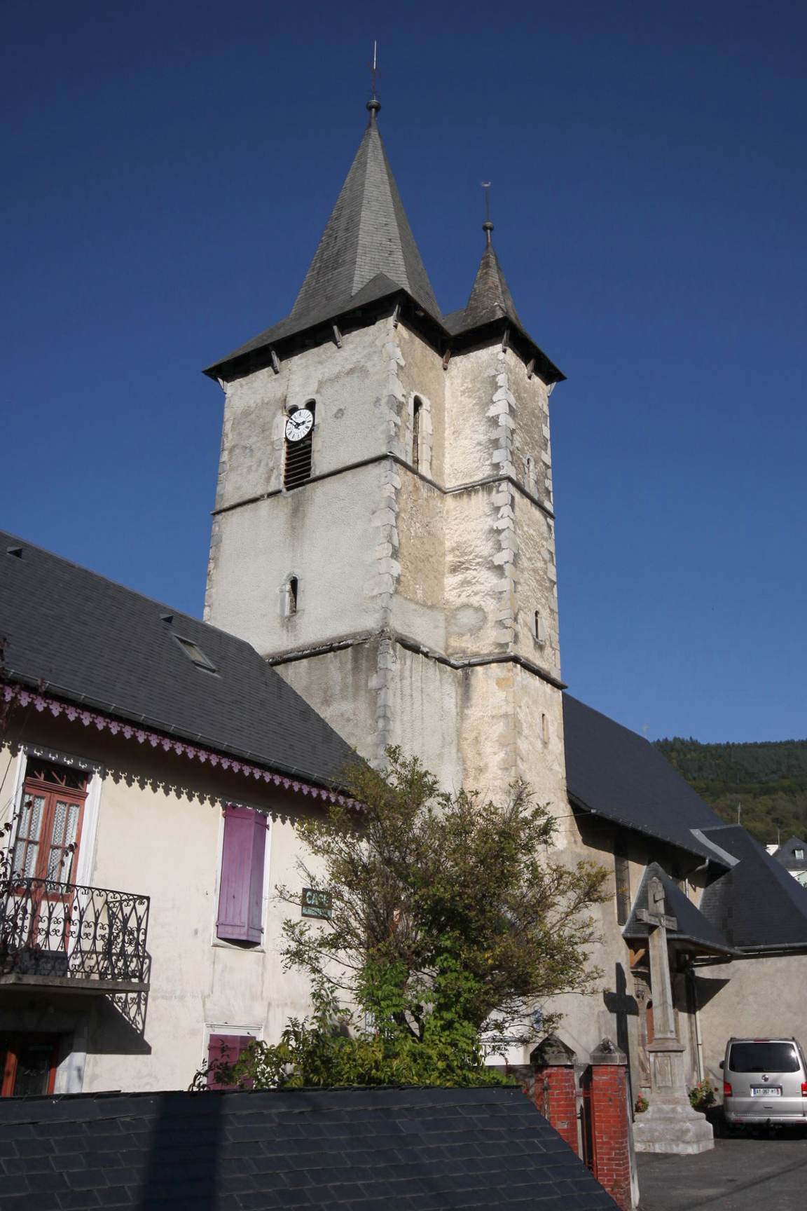 Église d'Asté dans les Hautes-Pyrénées. Ce bâtiment présente des caractéristiques archéologiques essentielles pour la compréhension de l'ensemble des édifices de la vallée de Campan et peut en conséquence servir d'élément de référence. Ses dispositions architecturales, notamment extérieures, sont intéressantes, en particulier le portail d'entrée au sud dans un appareillage de marbres rouges et verts de Campan (1775). C'est là l'église paroissiale du village foyer des ateliers de menuisiers sculpteurs qui ont décoré la plupart des églises haut-pyrénéennes du milieu du 17e siècle jusqu'au début du 19e. Le mobilier a ici été réalisé par Jean II Ferrère, après l'incendie de 1754. Dédiée à Saint Saturnin (